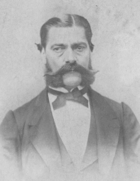 El presidente de la República del Ecuador, Rafael Carvajal, en el año 1865.